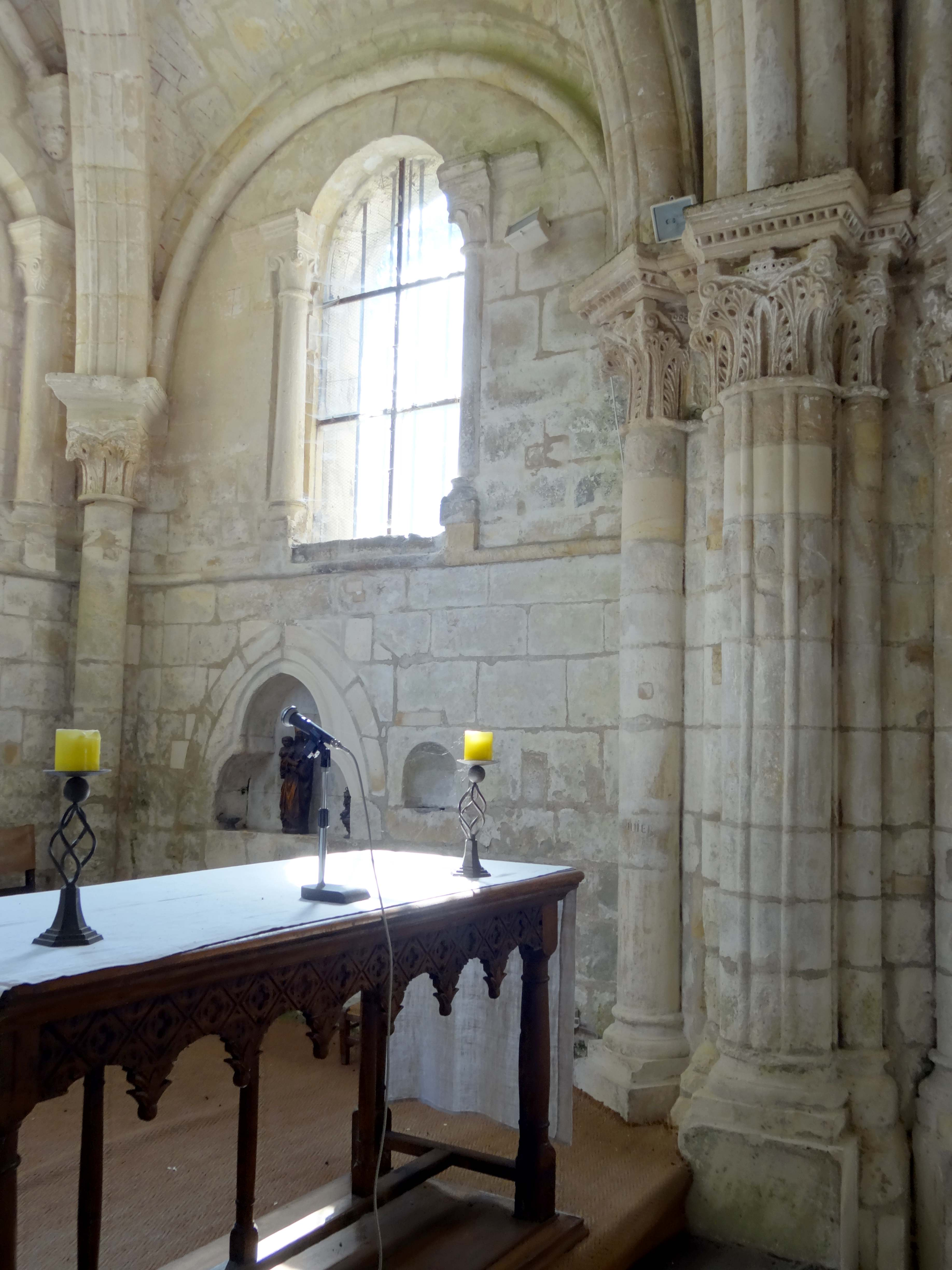 Intérieur de l'église - voir titre.